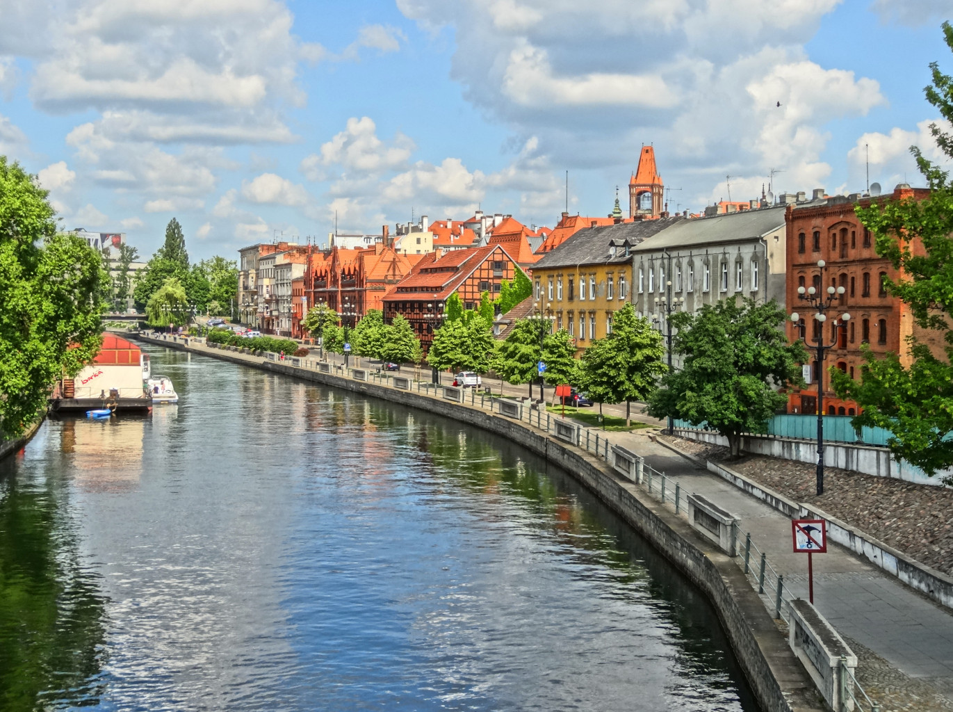 Północne nabrzeże Brdy w centrum Bydgoszczy